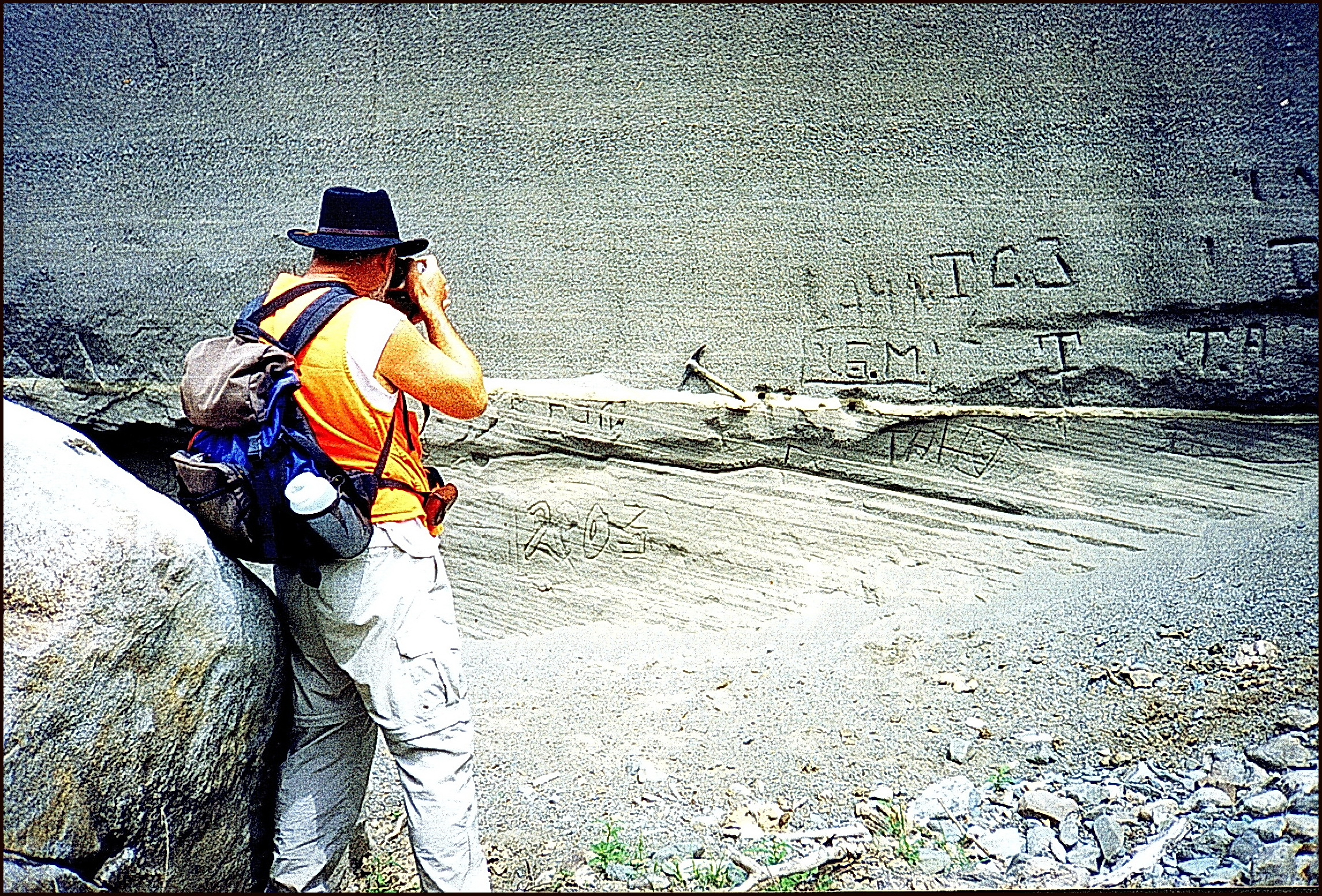 Текстуры заплесков в основании дилювиальной террасы в устьевой части Малого Яломана, левого притока р. Катуни, Алтай. Профессор Кинан Ли (Keenan Lee) на переднем плане.